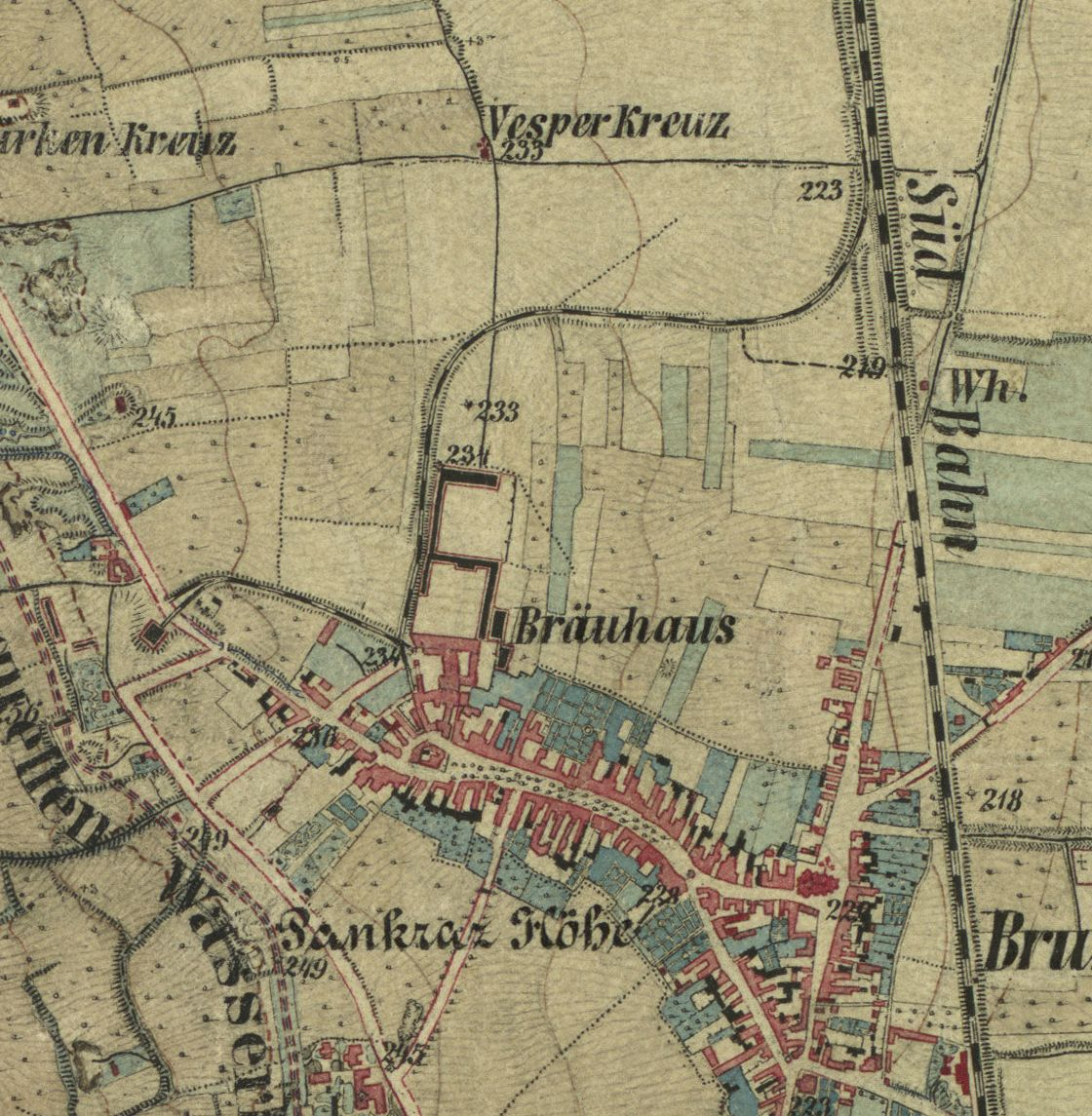 Ausschnitt der historischen Landkarte: Gradkartenblatt Zone 13 Colonne XIV Section d2 (später 4756/4b). Mödling, Perchtoldsdorf. Franzisco-josephinische (3.) Landesaufnahme der österreichisch-ungarischen Monarchie. Aufnahmeblatt 1:12.500. Aufgenommen 1872